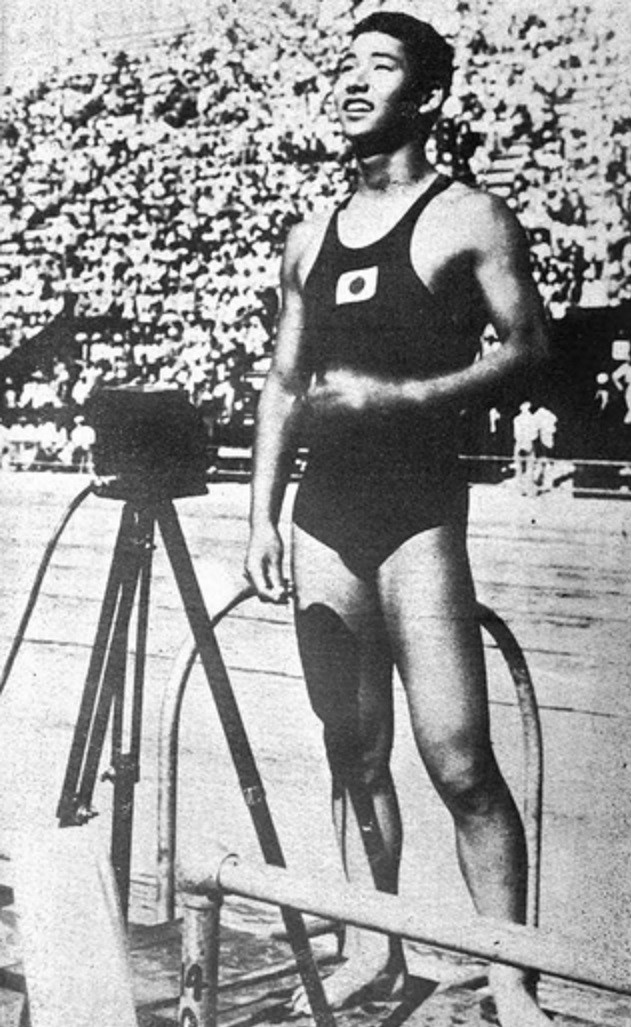 マイクの前に立つ宮崎